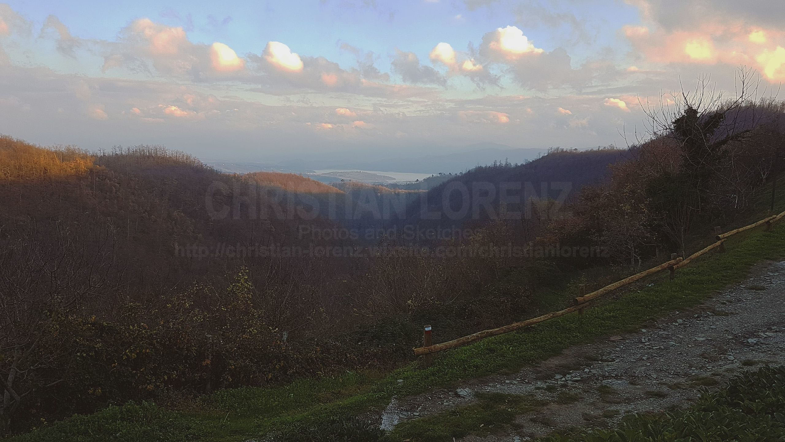 Lago di Bilancino da Montecuccoli